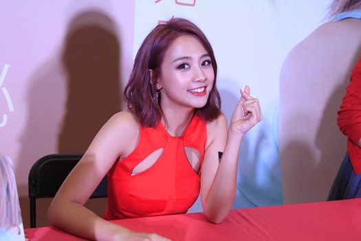 吳映潔 2016.10.15《I.MY.ME.EMMA秘》圖文寫真簽書會